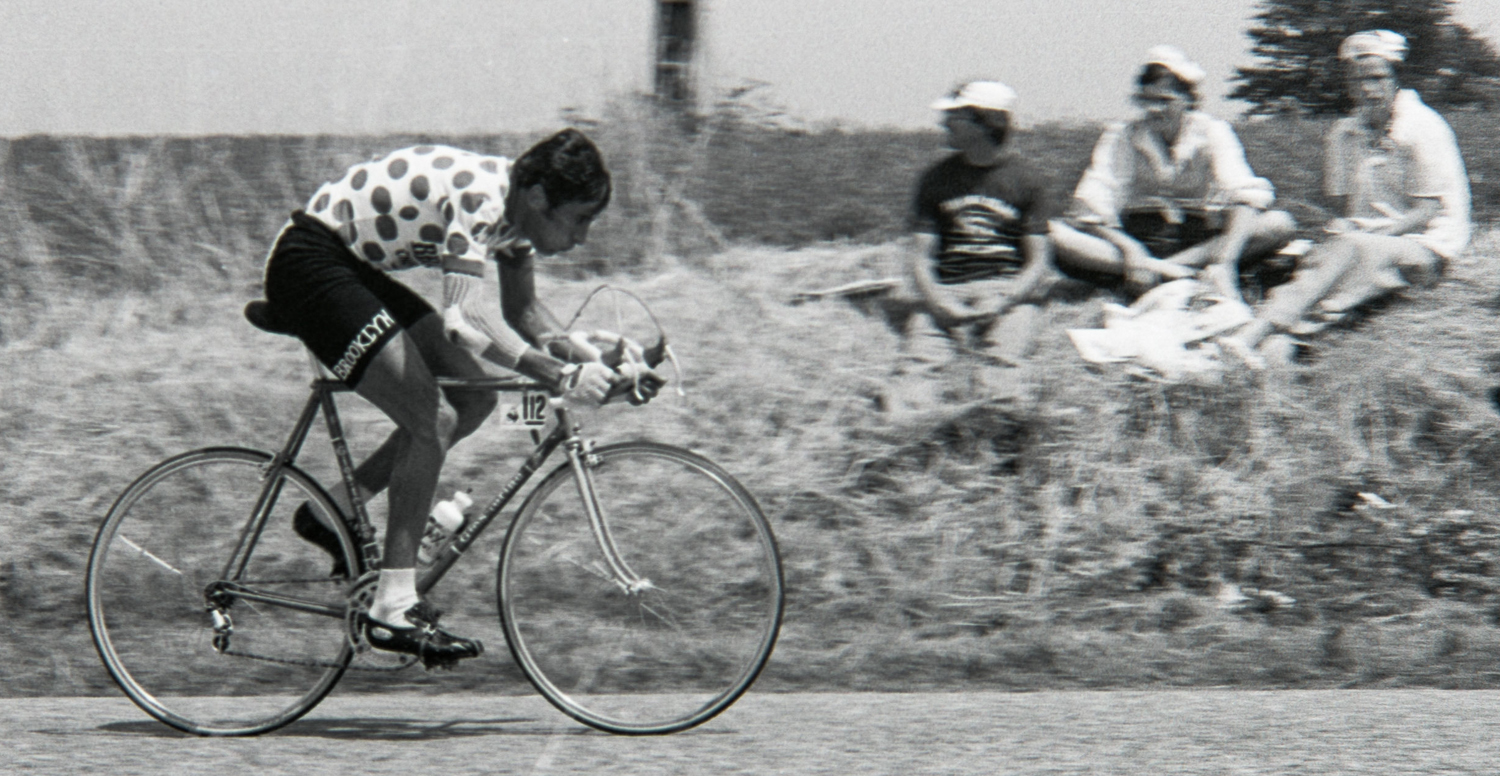 Giancarlo Bellini durant le Tour de France 1976. Photographie : René Milanese